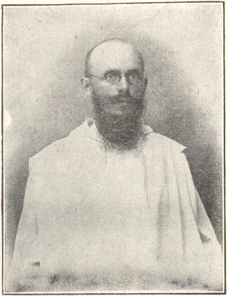 Thomas Spreiter (1865-1944) aus Regensburg, Titularbischof und Apostolischer Vikar in Afrika